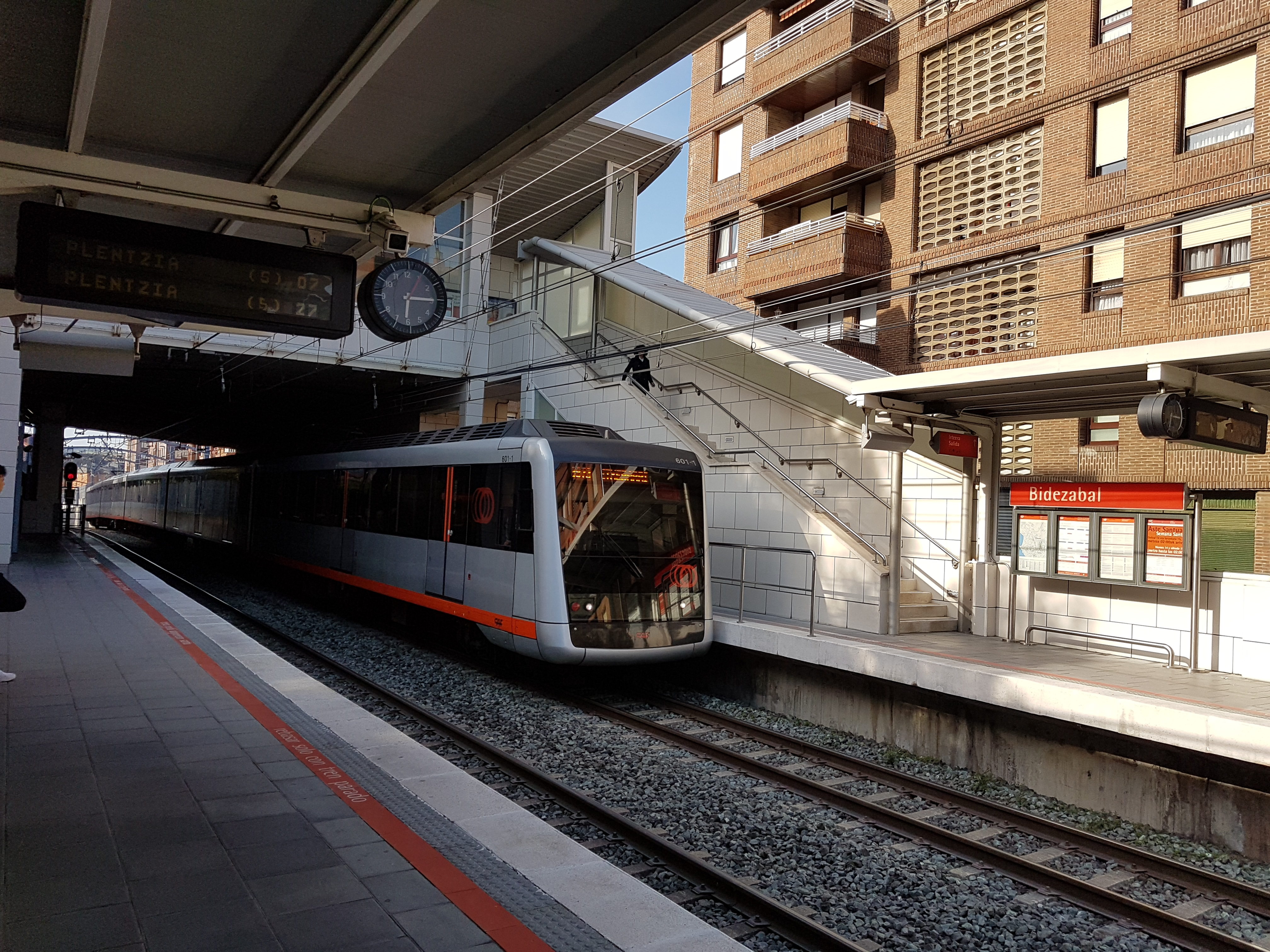 Estación de Bidezabal.